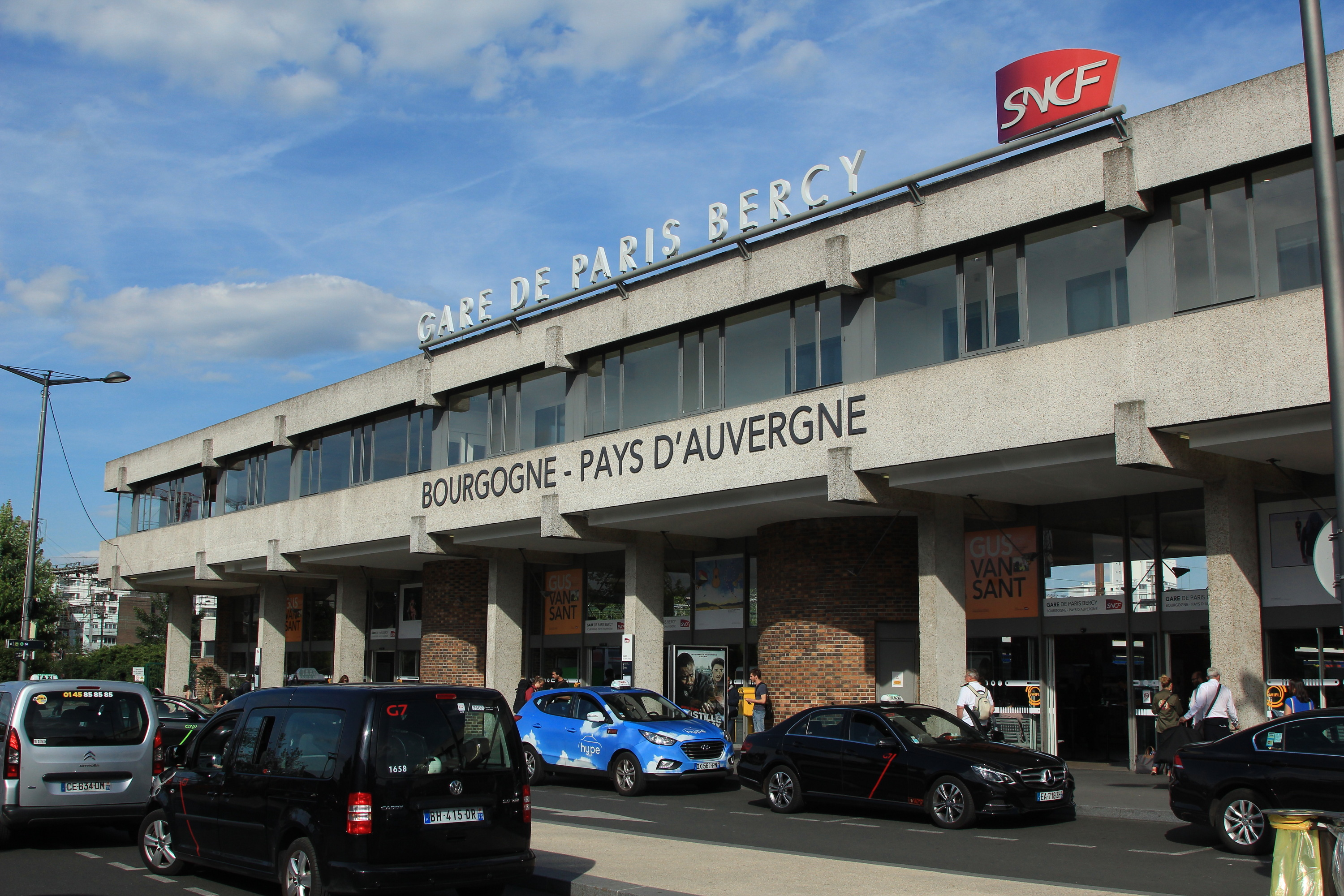 Bâtiment-voyageurs de la gare de Paris-Bercy à Paris.